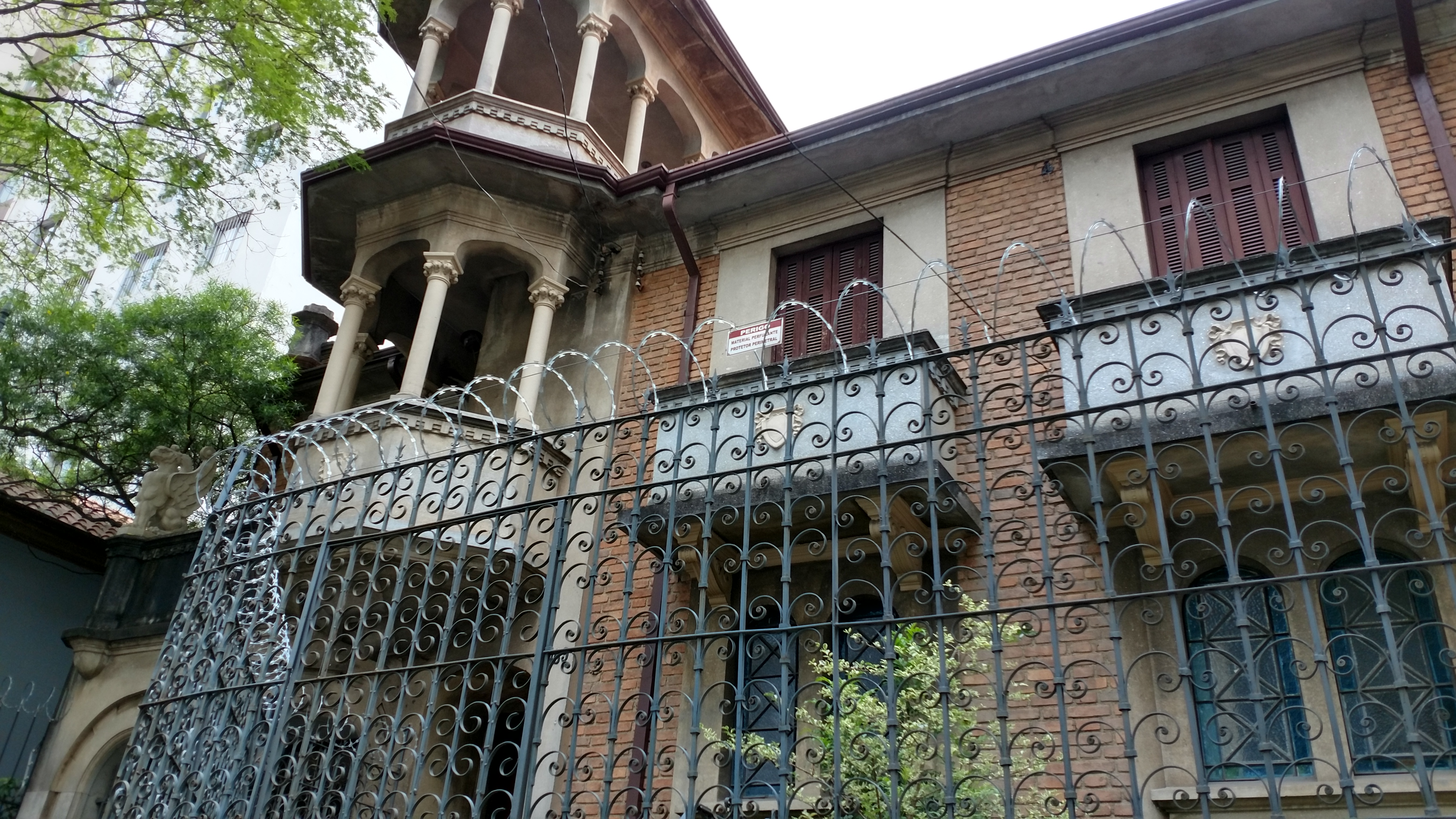 Gradil de ferro do Parque Residencial Savóia, com visão para a torre e as sacadas das casas situadas na Rua Vitórino Carmilo, 453 e 459, em São Paulo (SP)